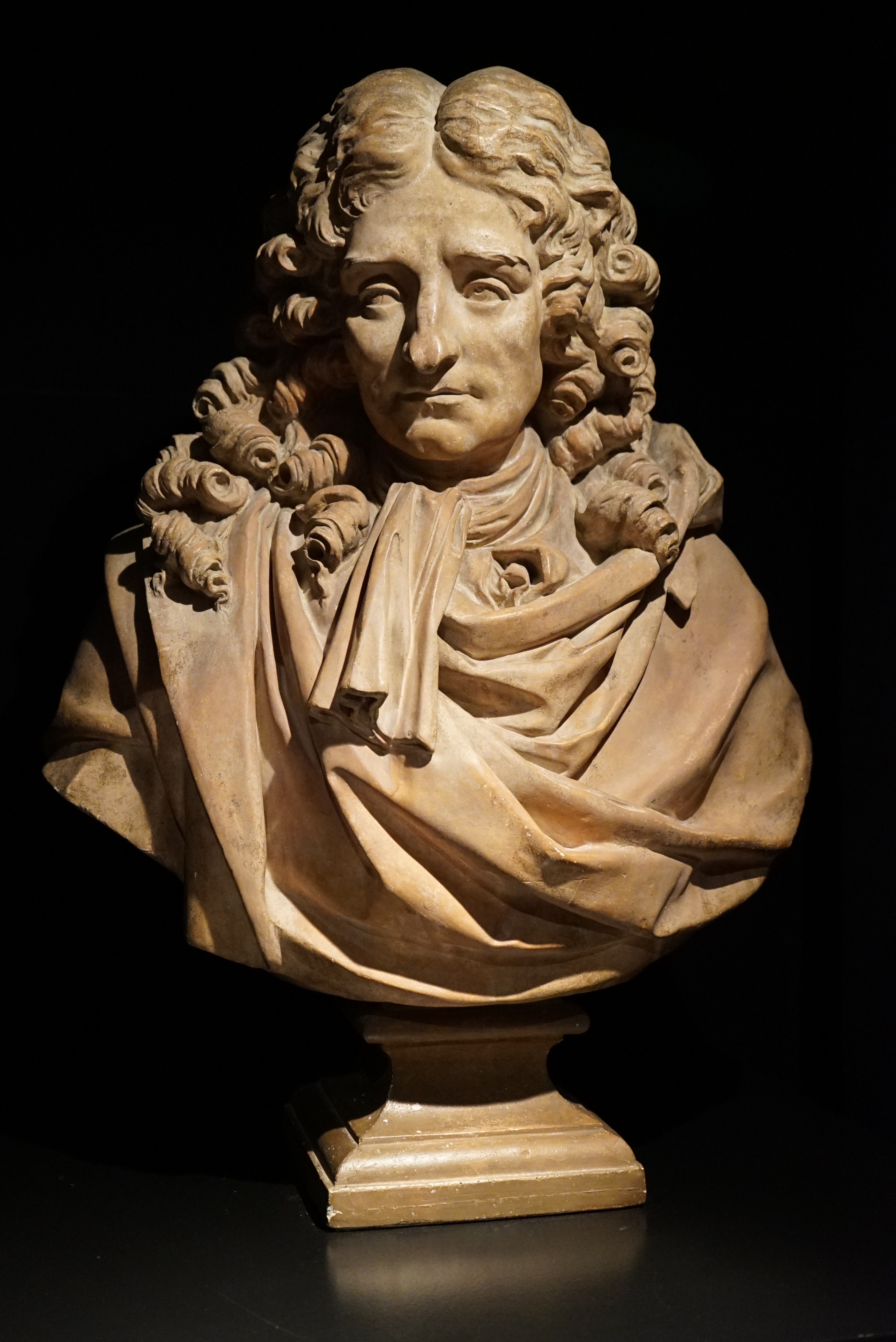 lors de la Nuit européenne des musées 2015 (Château-Thierry).